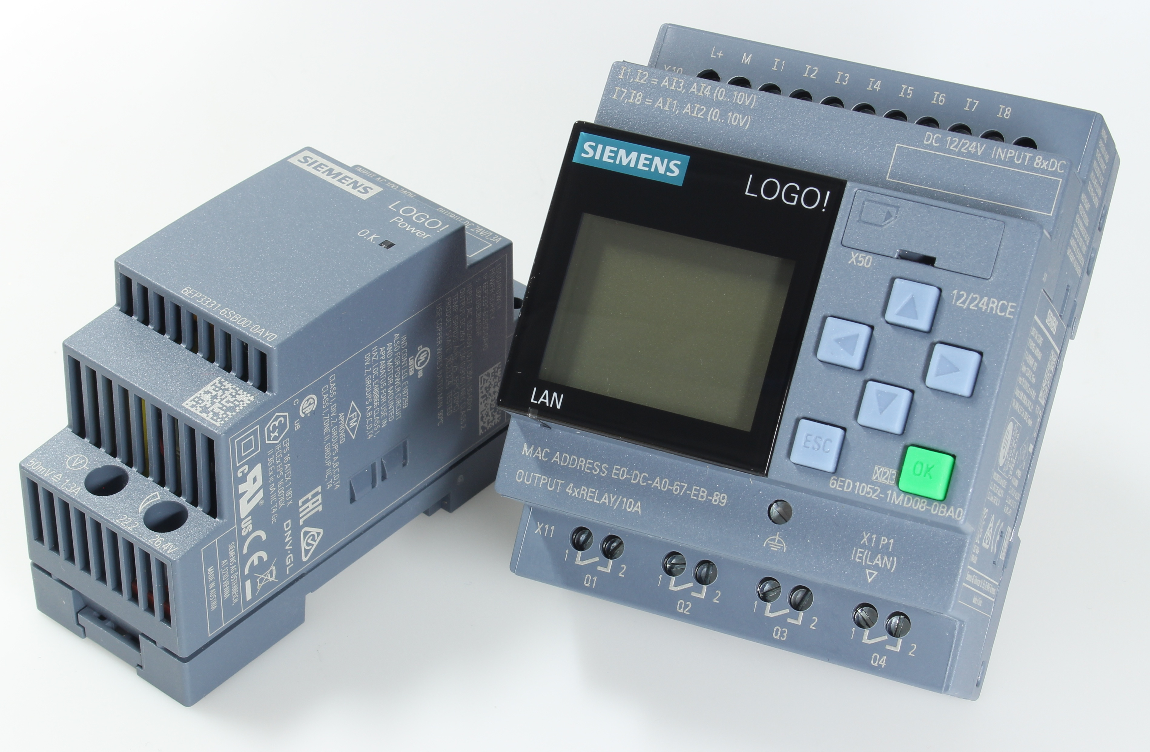 Siemens LOGO! 8 12/24 RCE + Power 6EP3331-6SB00-0AY0